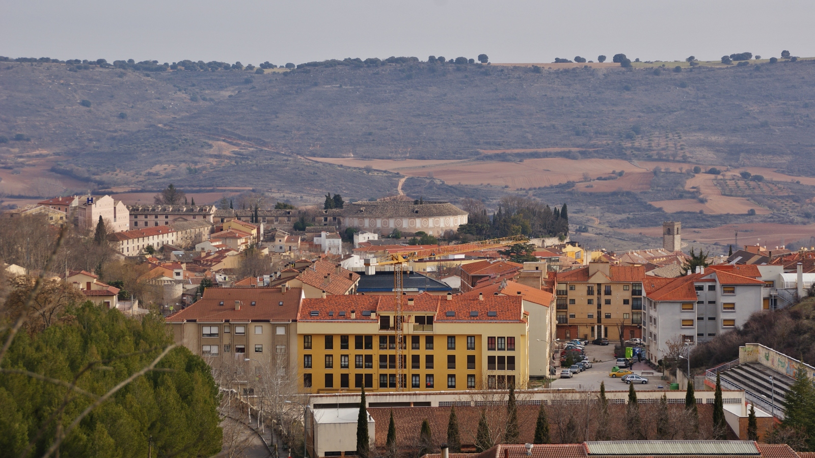 Real Fábrica de Paños de Carlos III de Brihuega, Guadalajara, siglo XVIII